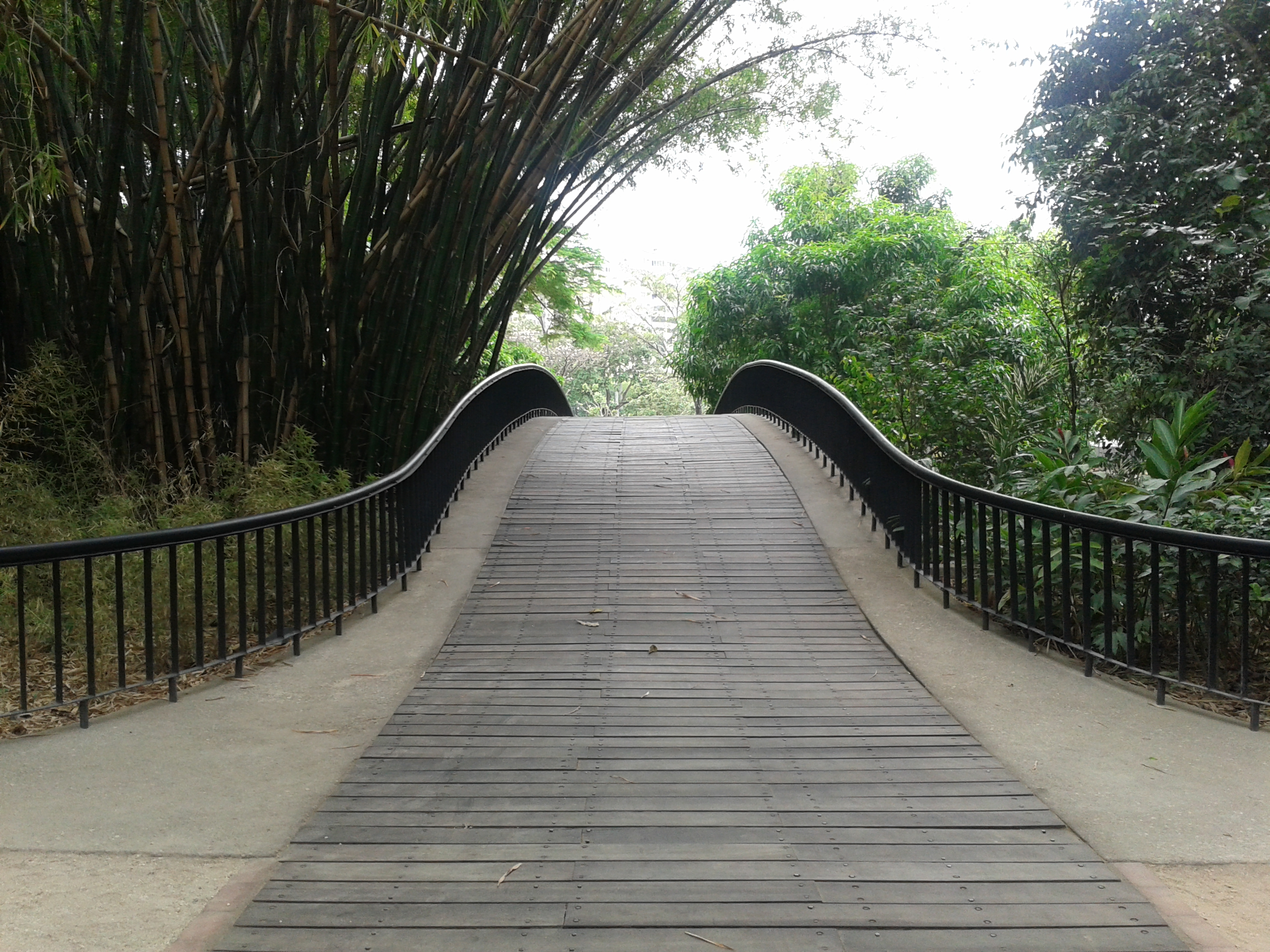 Puente en el Parque Negra Hipólita